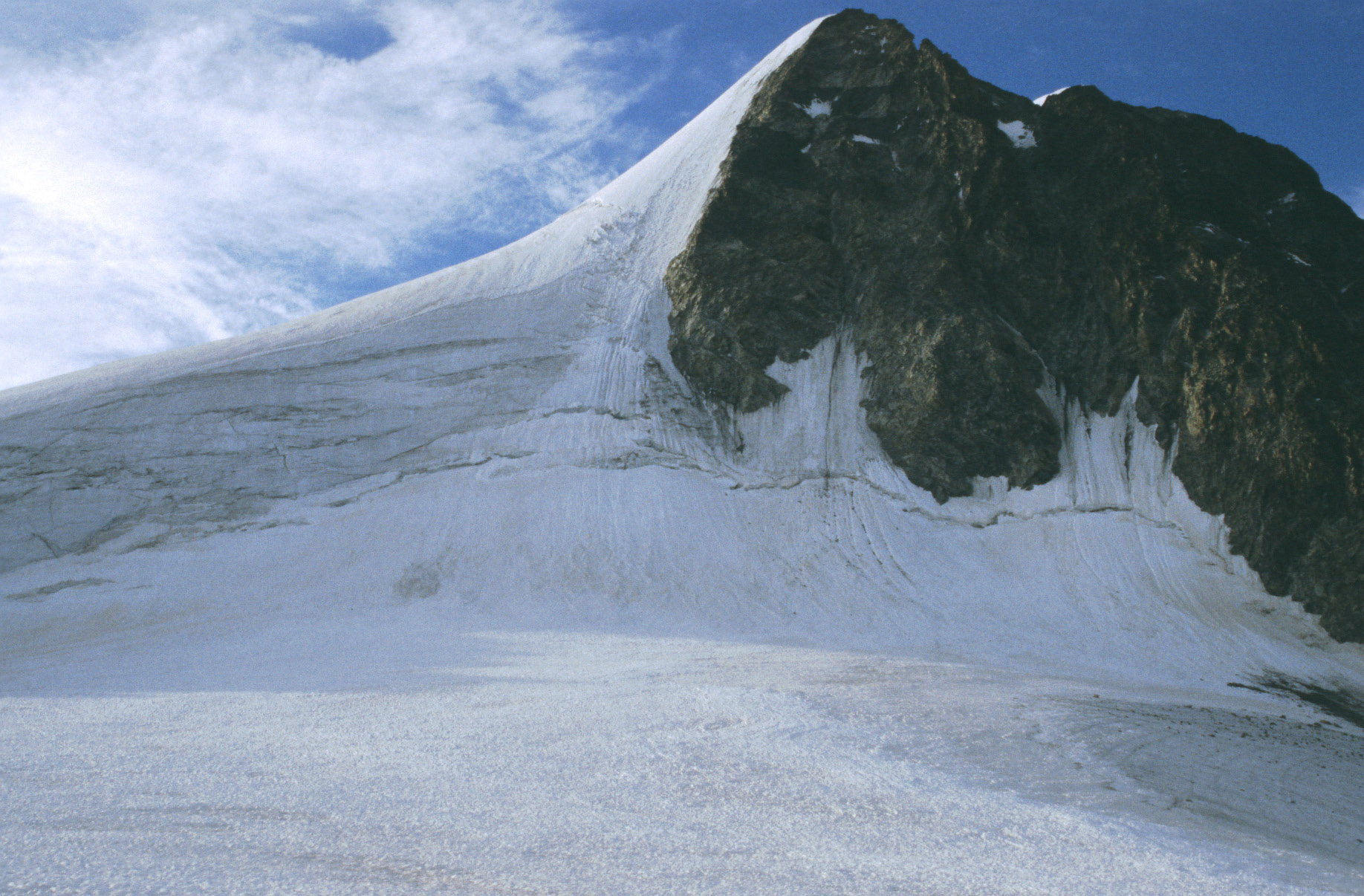 Piz Morteratsch von Norden